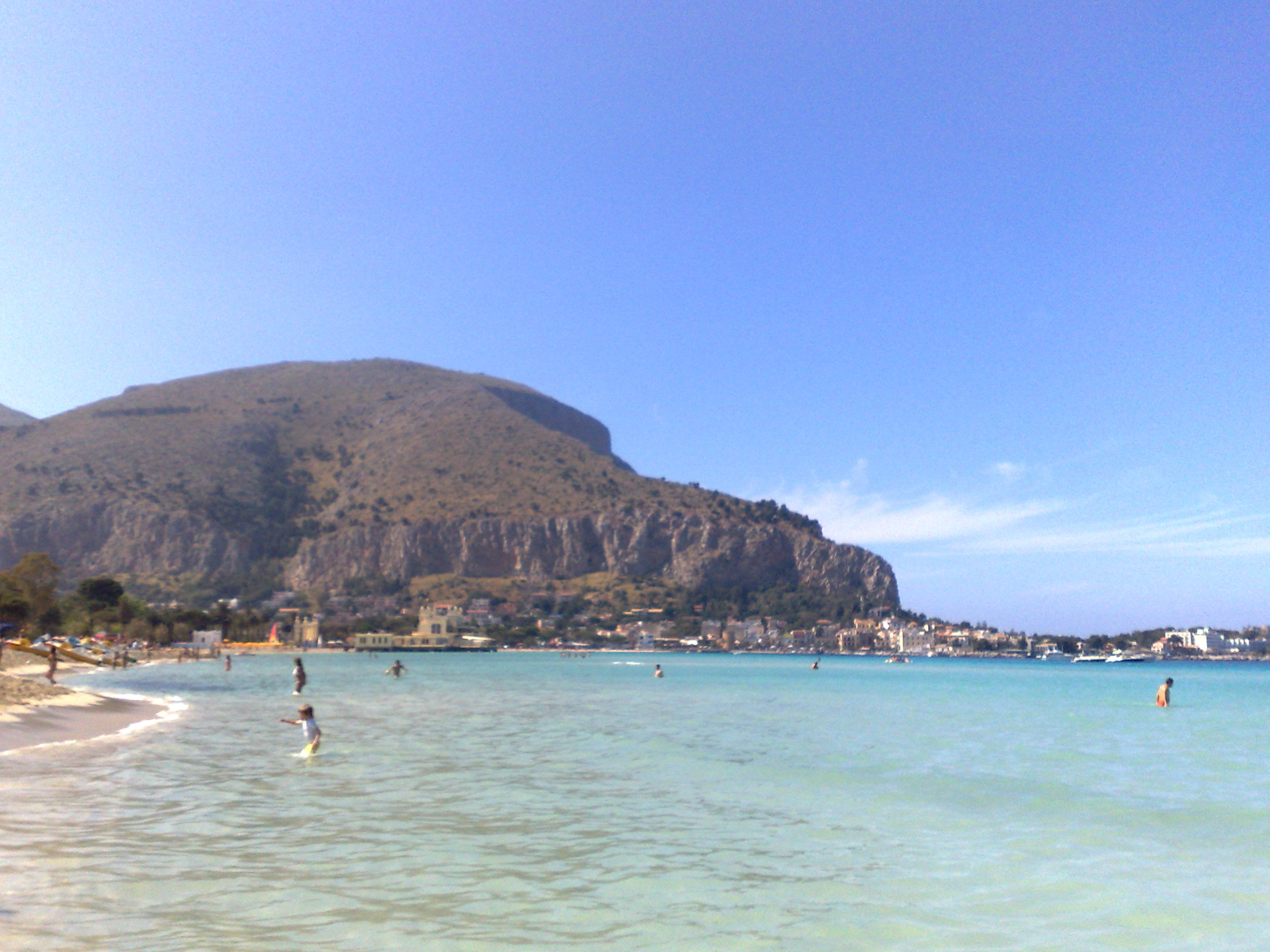 Mondello beach, Palermo